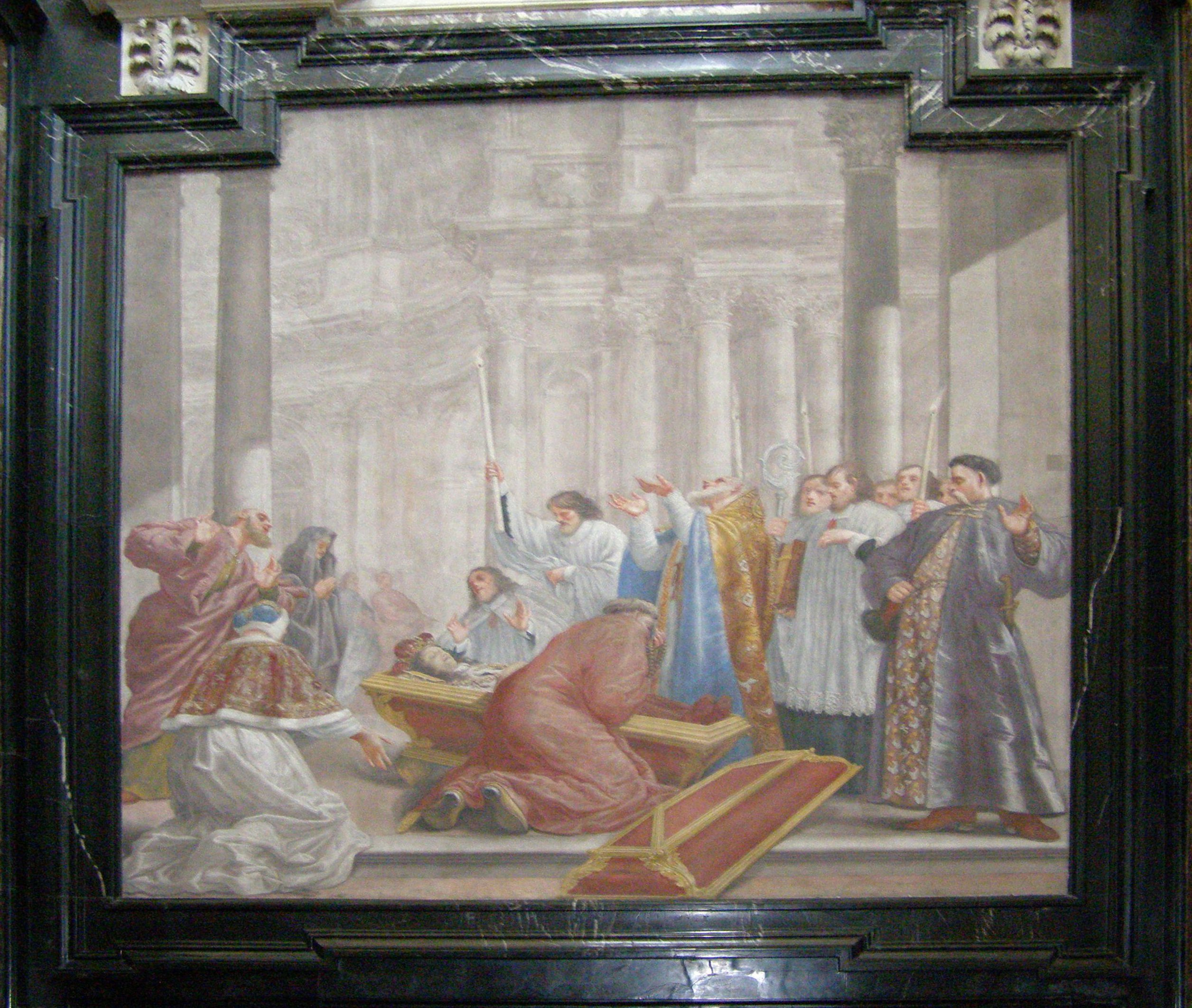 Freski Michelangelo Palloniego w kaplicy św. Kazimierza w katedrze wileńskiej